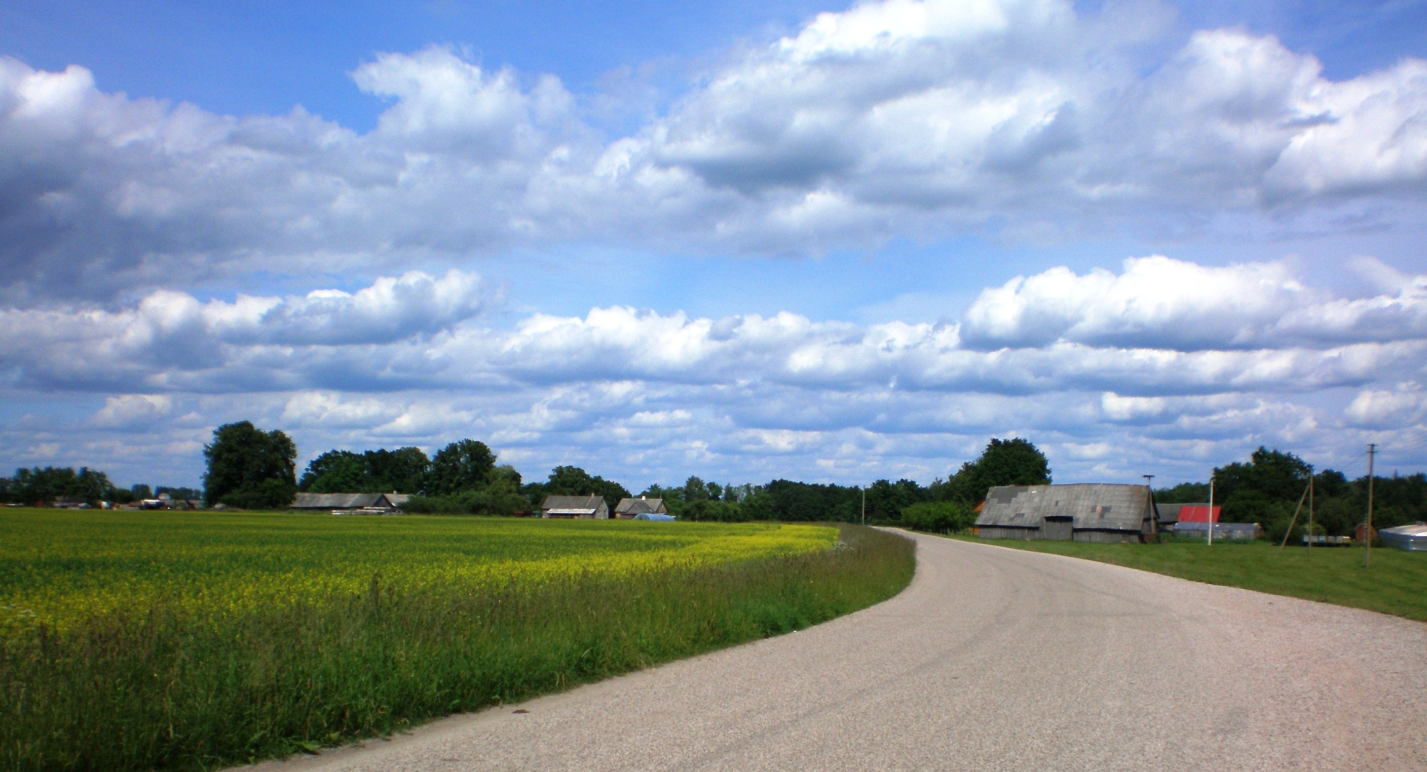 Ąžuolaičiai, Dotnuvos sen., Kėdainių raj.